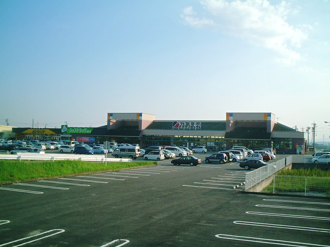 カネスエ東員店の画像